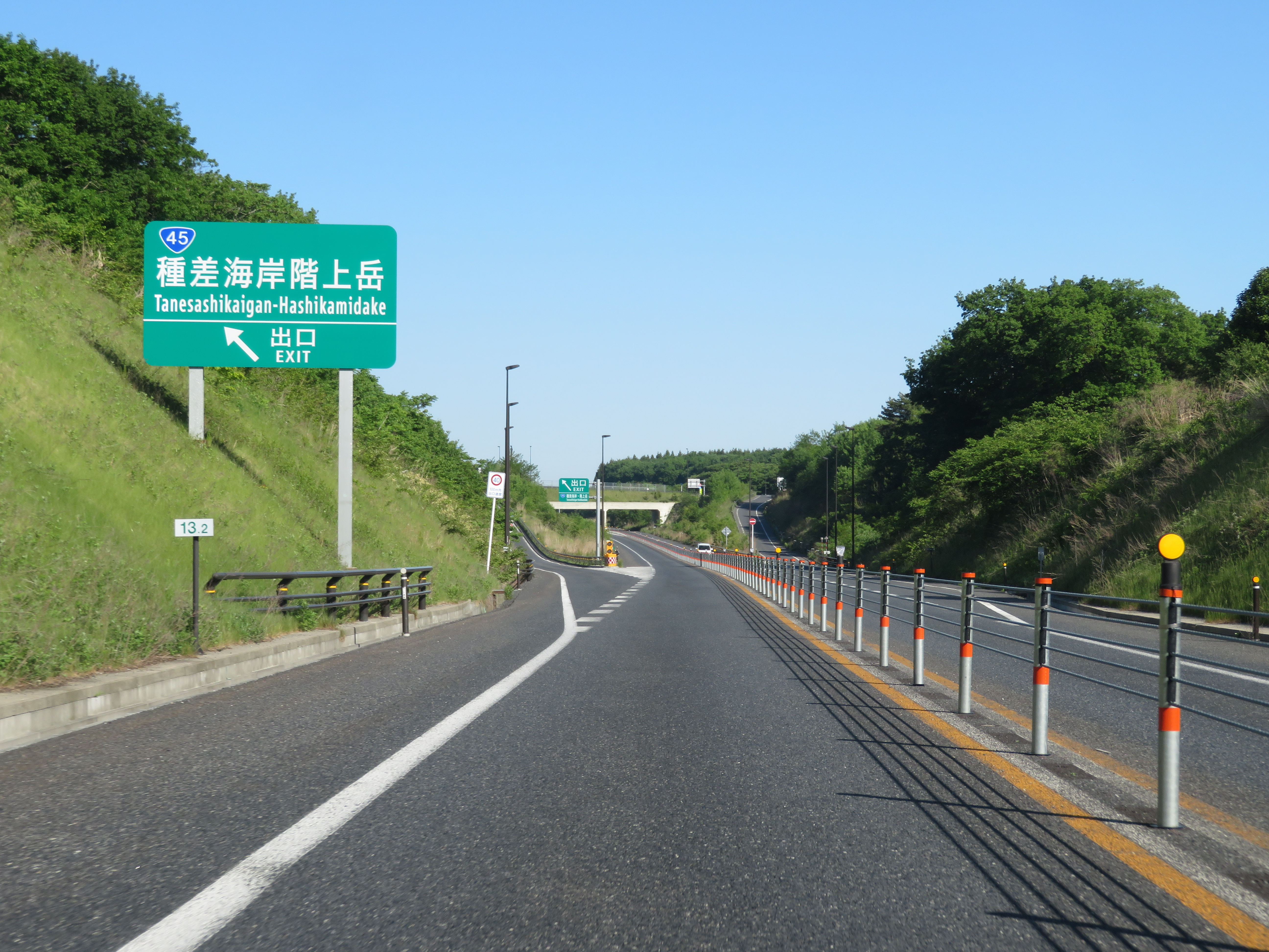 八戸久慈自動車道種差海岸階上岳ＩＣ出入口付近（久慈方面側から撮影） Canon PowerShot SX720 HS